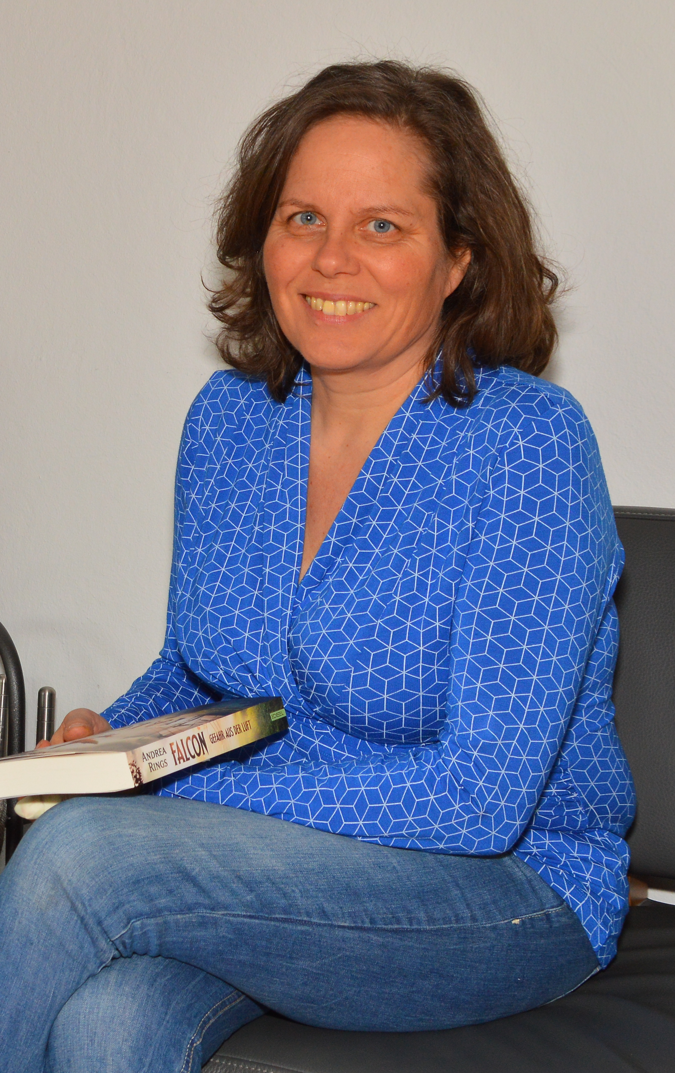 Die deutsche Kinder- und Jugendbuchautorin Andrea Rings im April 2019